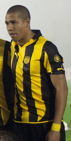 Peñarol - Santos